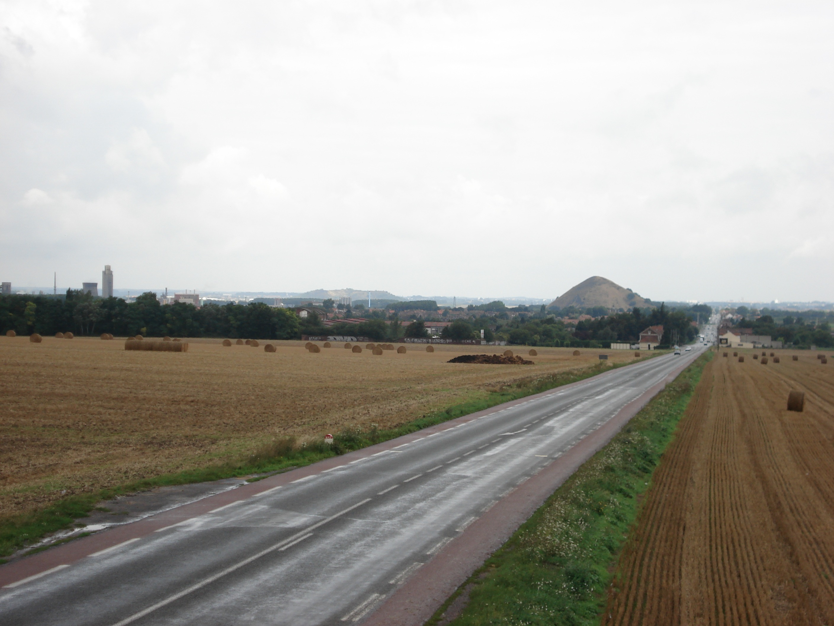 Mazingarbe et la route de Lens (ou route de Béthune) vu du mémorial de Loos. On voit aussi un petit terrils sur la gauche de la route.